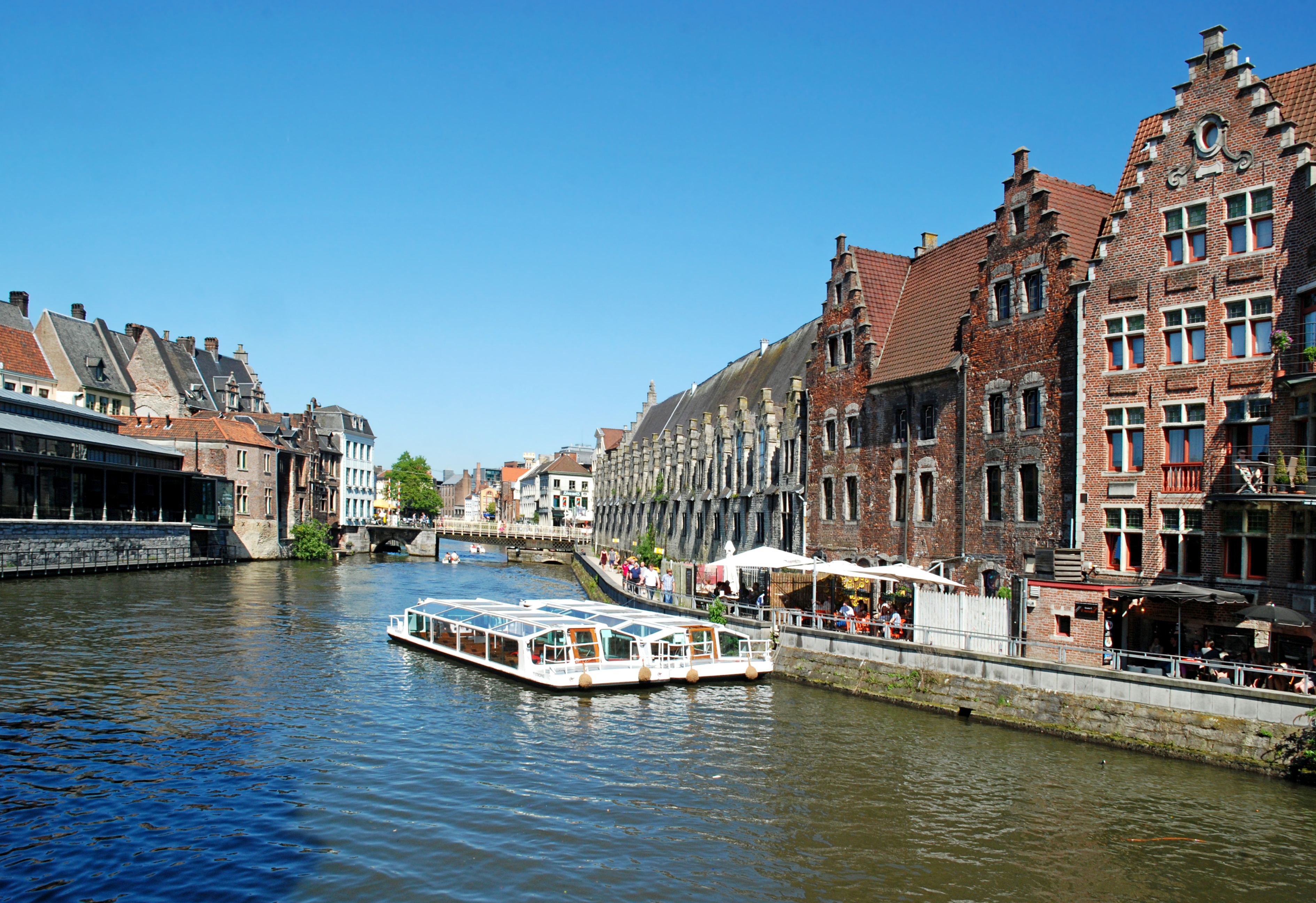 Belgique - Gand - Grande Boucherie (Groot Vleeshuis 1407-1419)